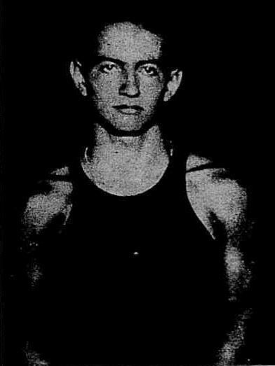 fonte: Sport Illustrado, 2º anno, n.º 54, p. 6. 19 de abril de 1939